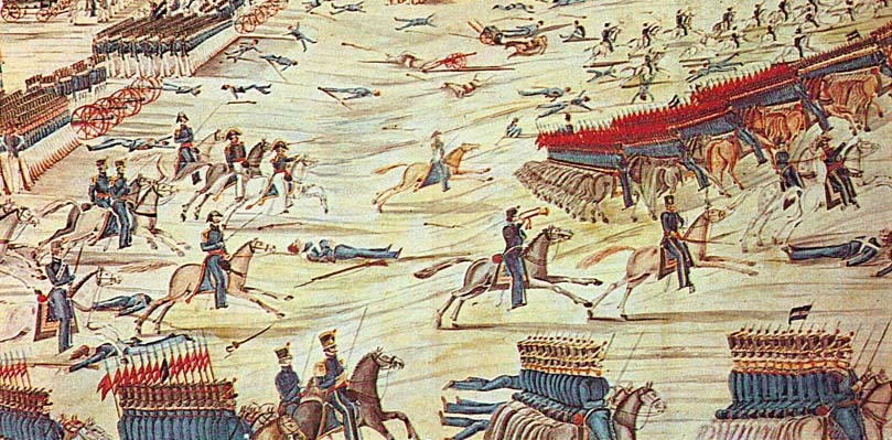 ituzaingo